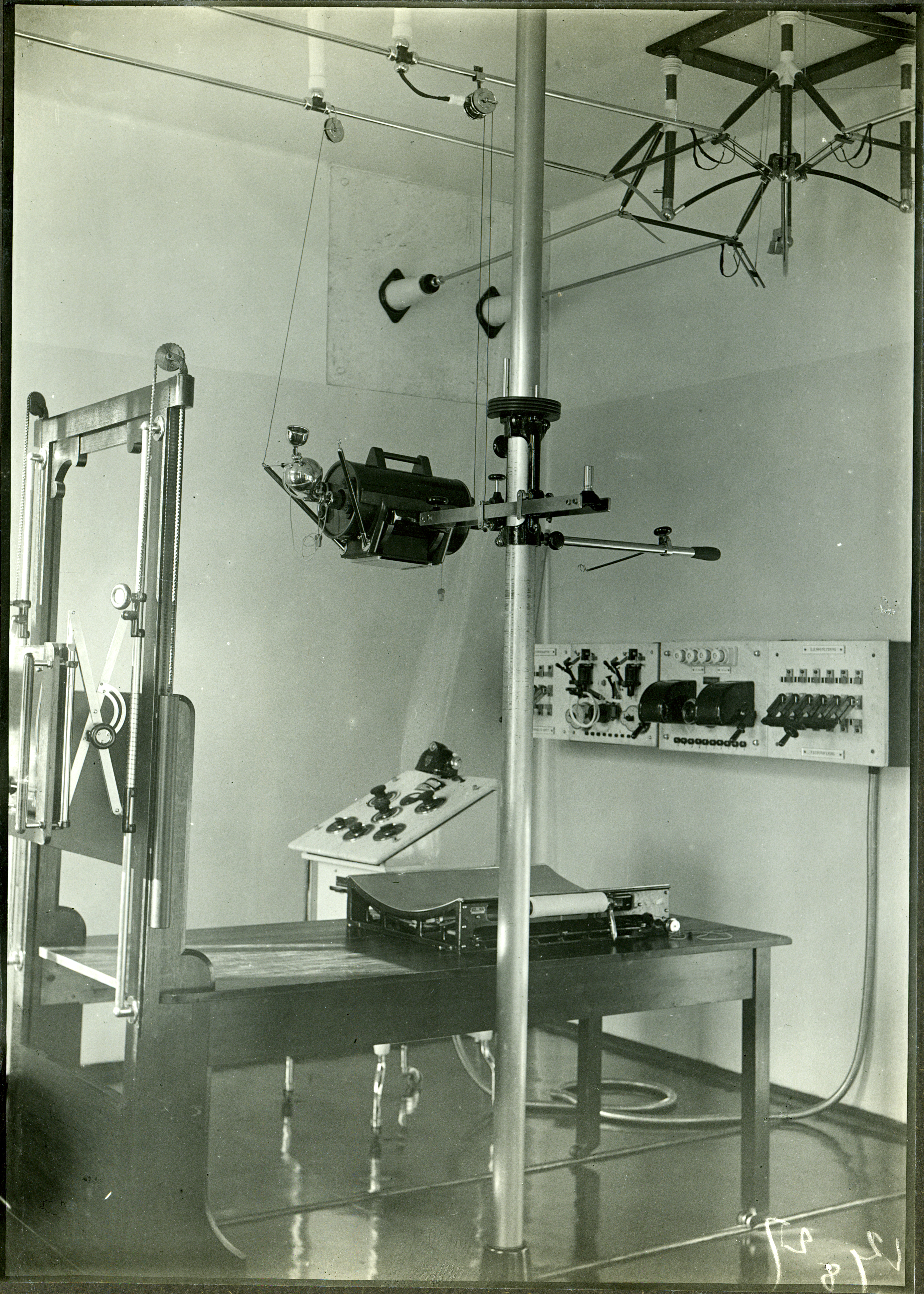 Bildet er hentet fra Arkivverket. Interiør fra røntgenfotograferingsrom. Arkivinstitusjon : Riksarkivet Arkivnavn : Medisinaldirektøren, Overlegen for tuberkulosen/Ktr. for lege- og sunnhetsvesen, tuberkulosesaker Sted : Norge, Hordaland, Os, Hagevik Emneord: Sykehus, Tuberkulose Avbildet